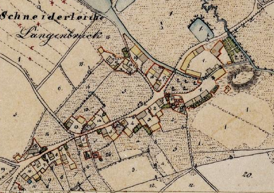 Langenbruck auf dem Bayerischen Urkataster von 1832